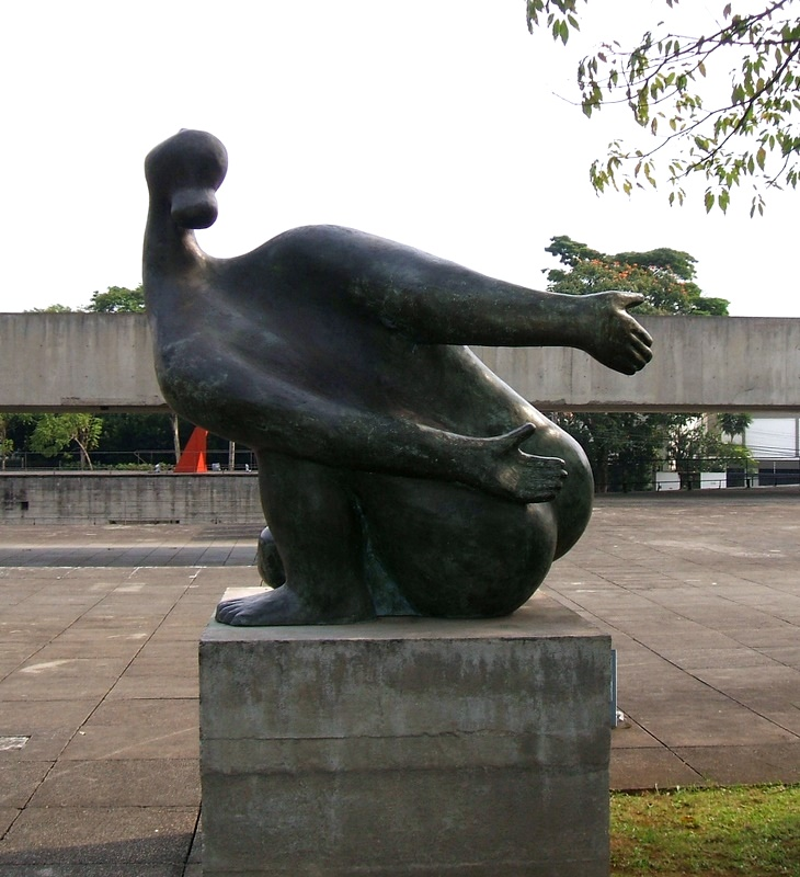 Sonia Ebling (1918-2006) - Arminda, década de 1980. Acervo do Museu Brasileiro da Escultura, São Paulo.